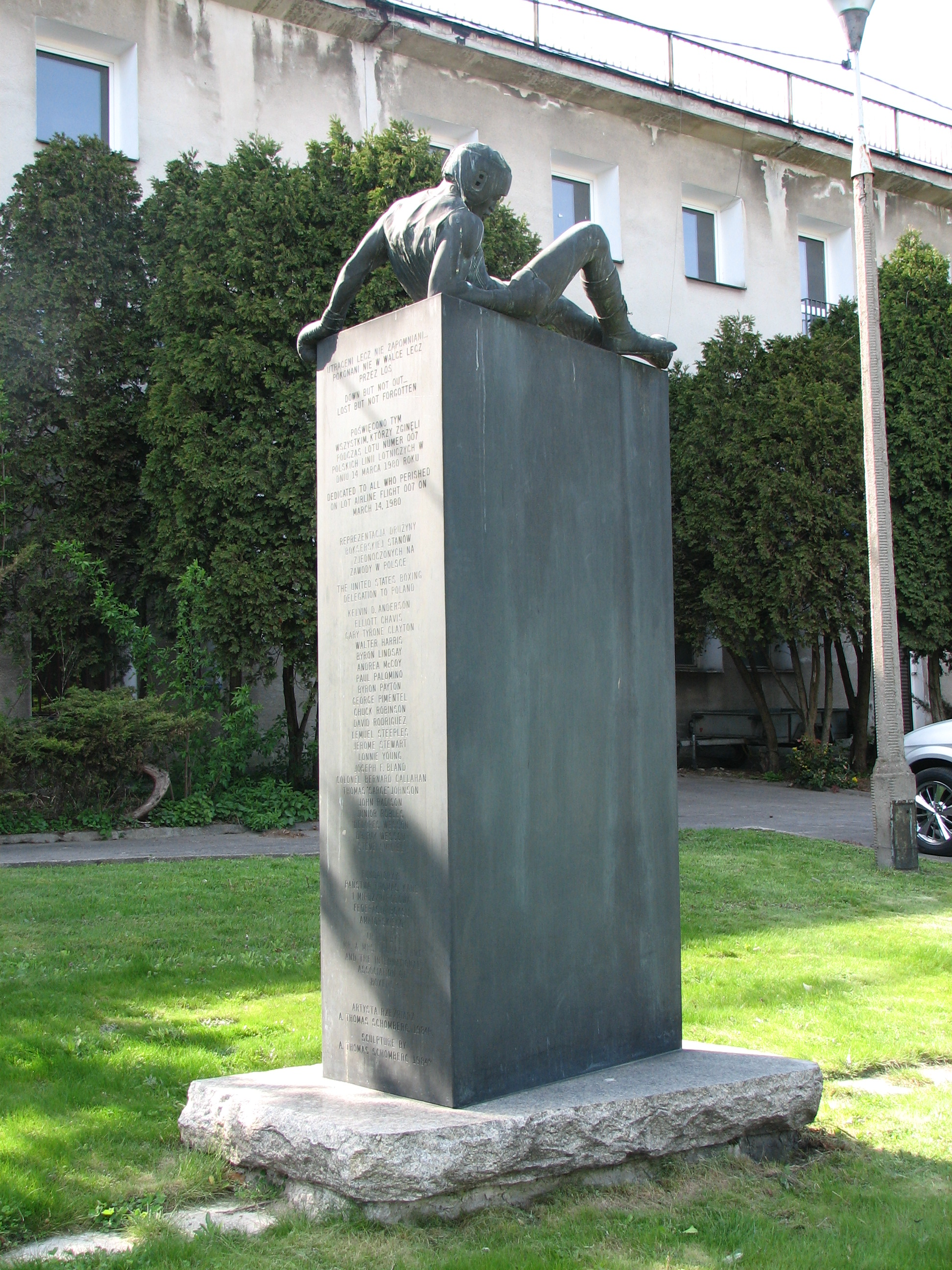 Pomnik ofiar katastrofy lotniczej w 1980 roku w Warszawie, ul. Wawelska